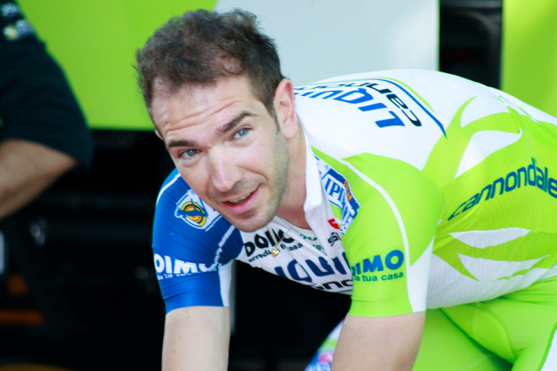 Prologue (Martigny) du Tour de Romandie 2011